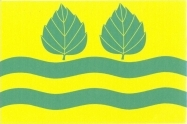 Březí nad Oslavou, vlajka. List tvoří pět vodorovných pruhů, střídavě žlutých a zelených, v poměru 4 : 1 : 1 : 1 : 1. Zelené pruhy jsou vlnité se třemi vrcholy a dvěma prohlubněmi. V horním pruhu nad prohlubněmi dva zelené vztyčené březové listy. Poměr šířky k délce listu je 2 : 3.